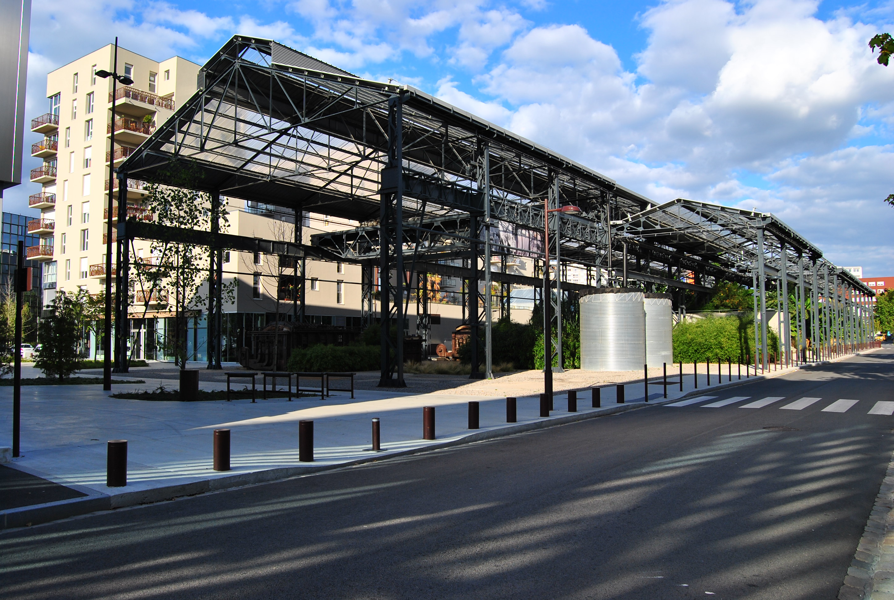 Le Jardin des Fonderies sur l'Île de Nantes, vu du sud-ouest